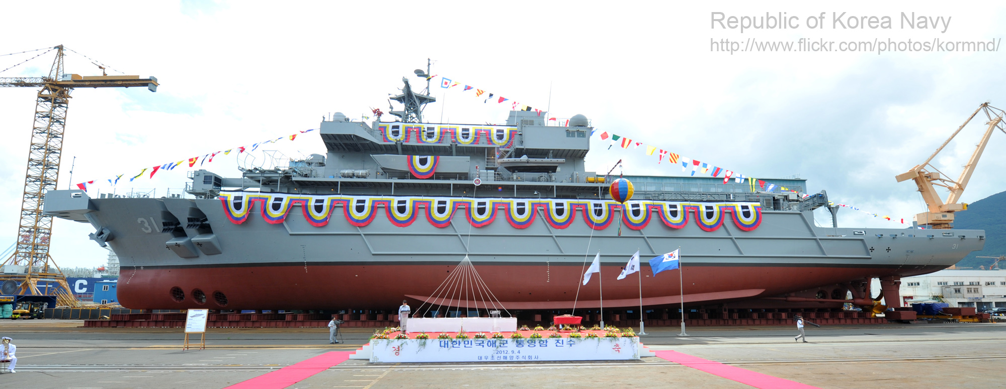 2012. 9. 4 거제 대우해양조선에서 열린 통영함 진수식 사진입니다 촬영자 : 강진욱, 김상근, 안정민